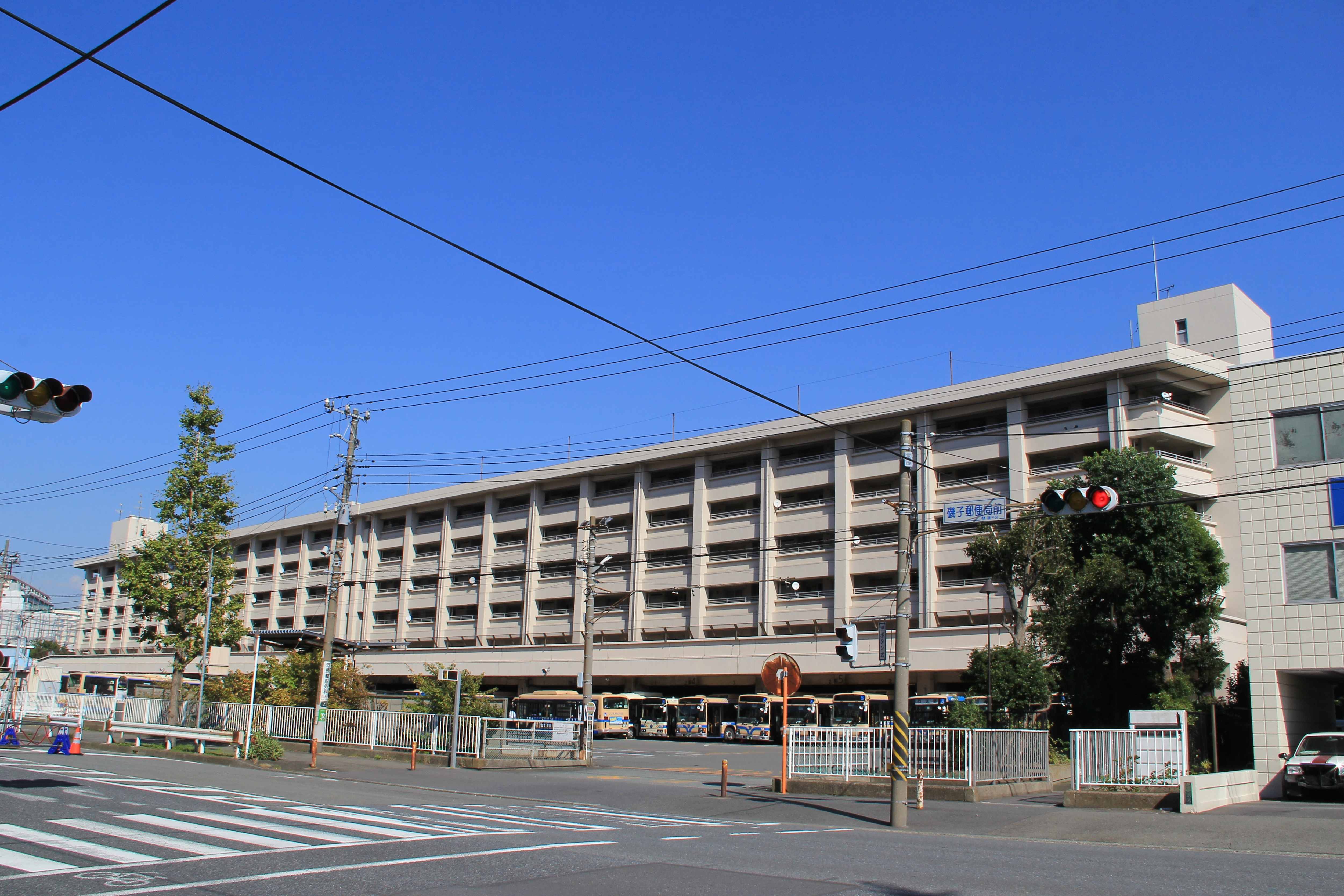 横浜市営バス・横浜交通開発磯子営業所。2014年10月19日撮影